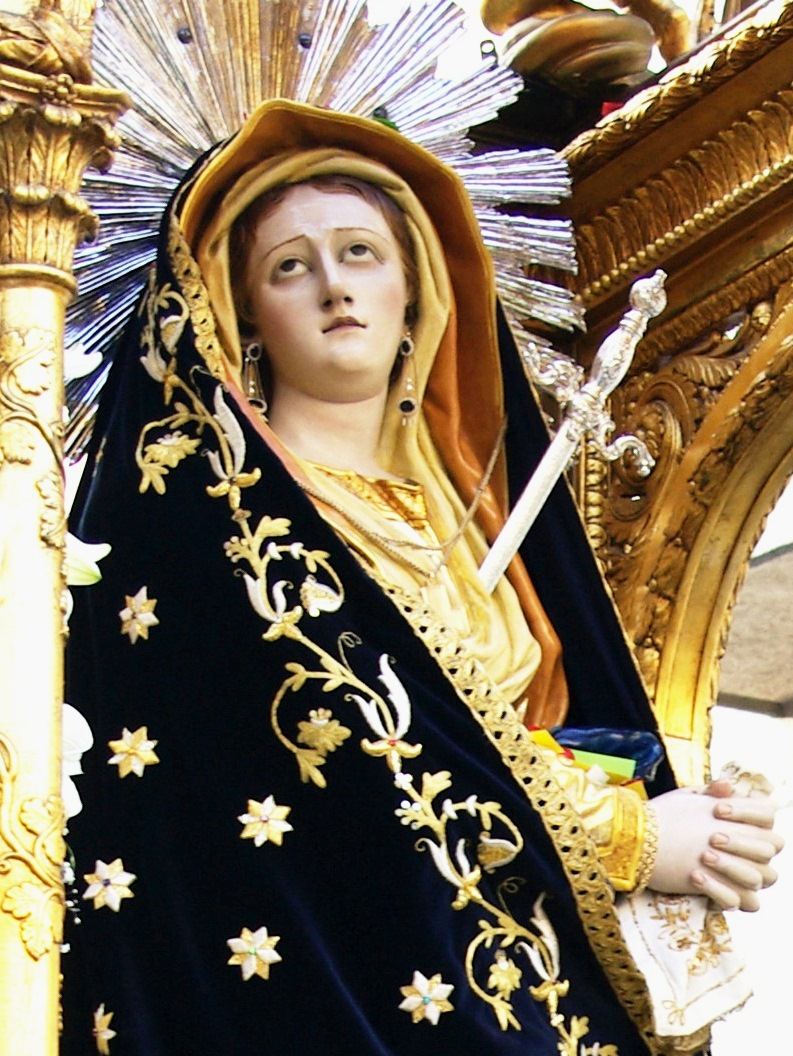 Simulacro settecentesco di Maria SS. Addolorata venerato a Comiso (Ragusa) - Patrona della Chiesa Madre "Santa Maria delle Stelle"